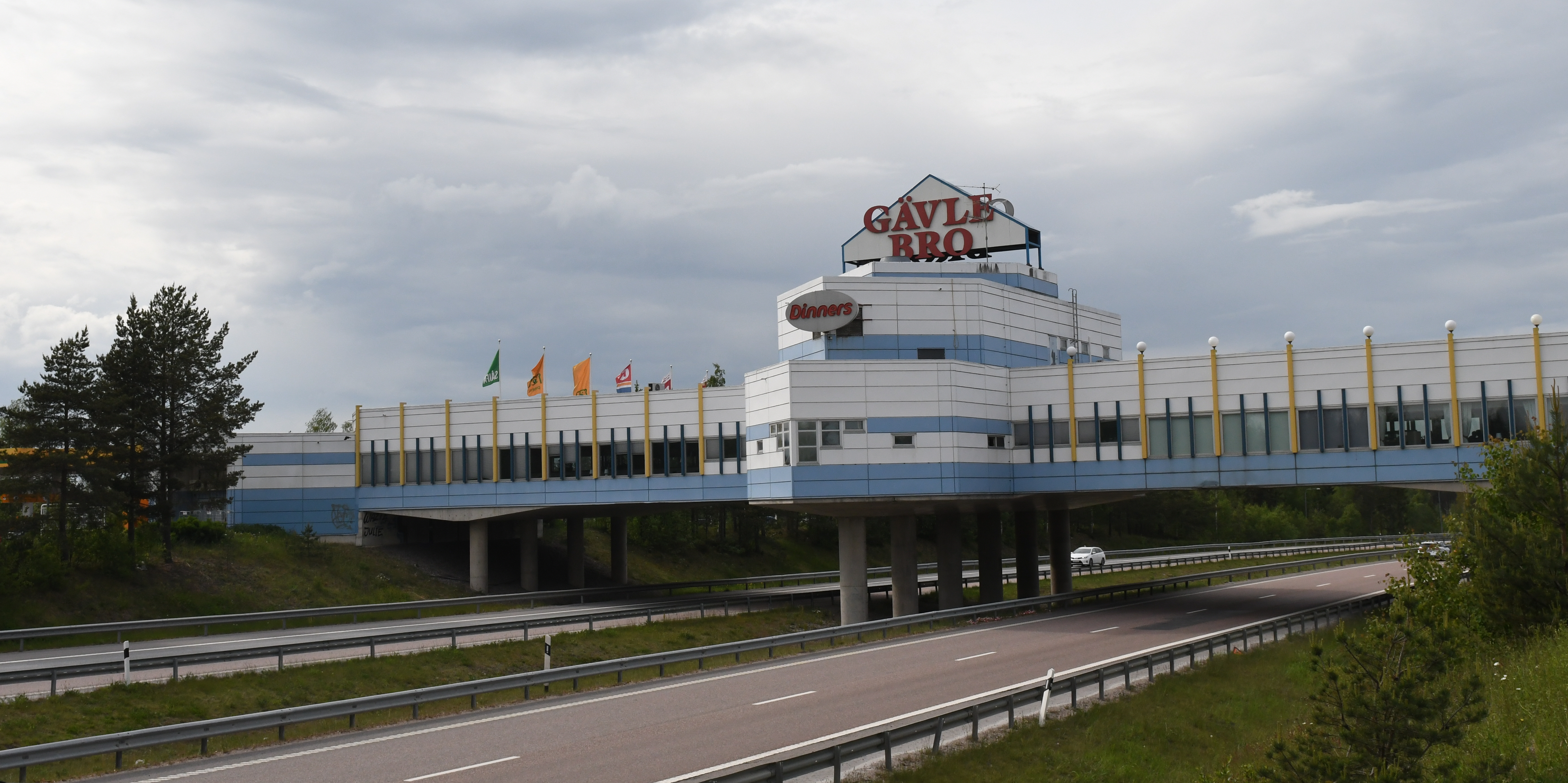 Gävle bro sommaren 2020